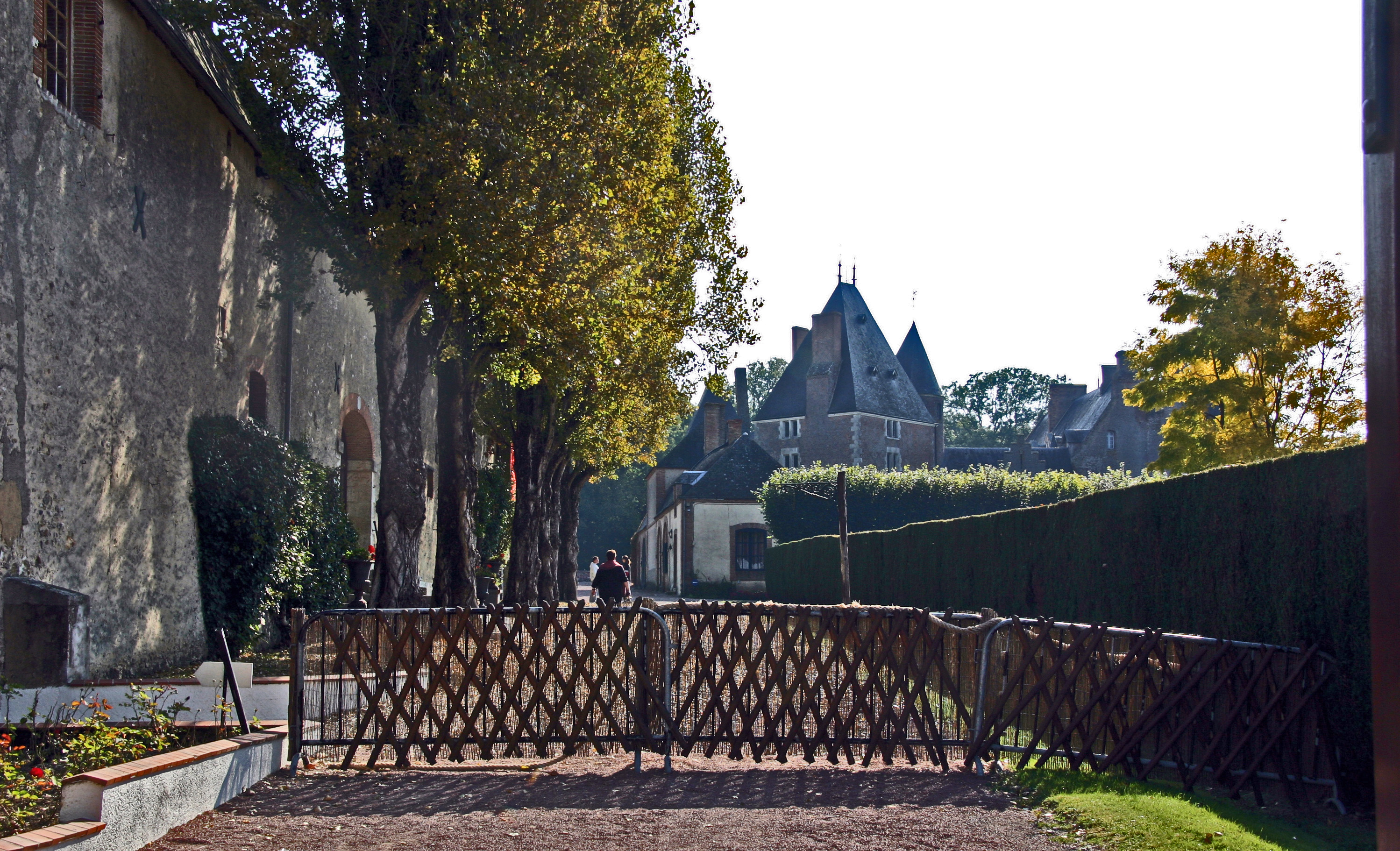 Schloss in Blancafort